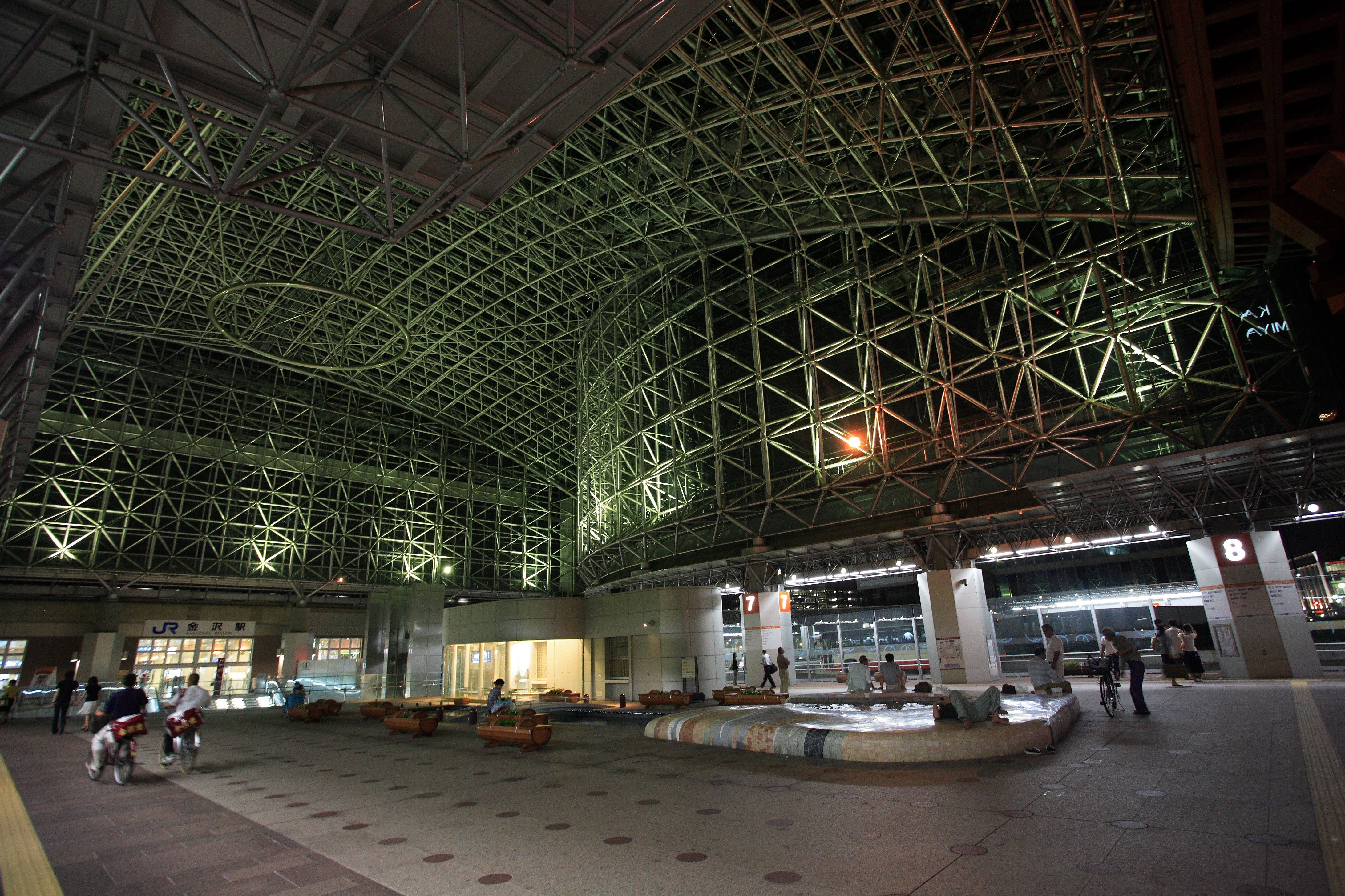 Kanazawa St., Kanazawa, Ishikawa, Japan.